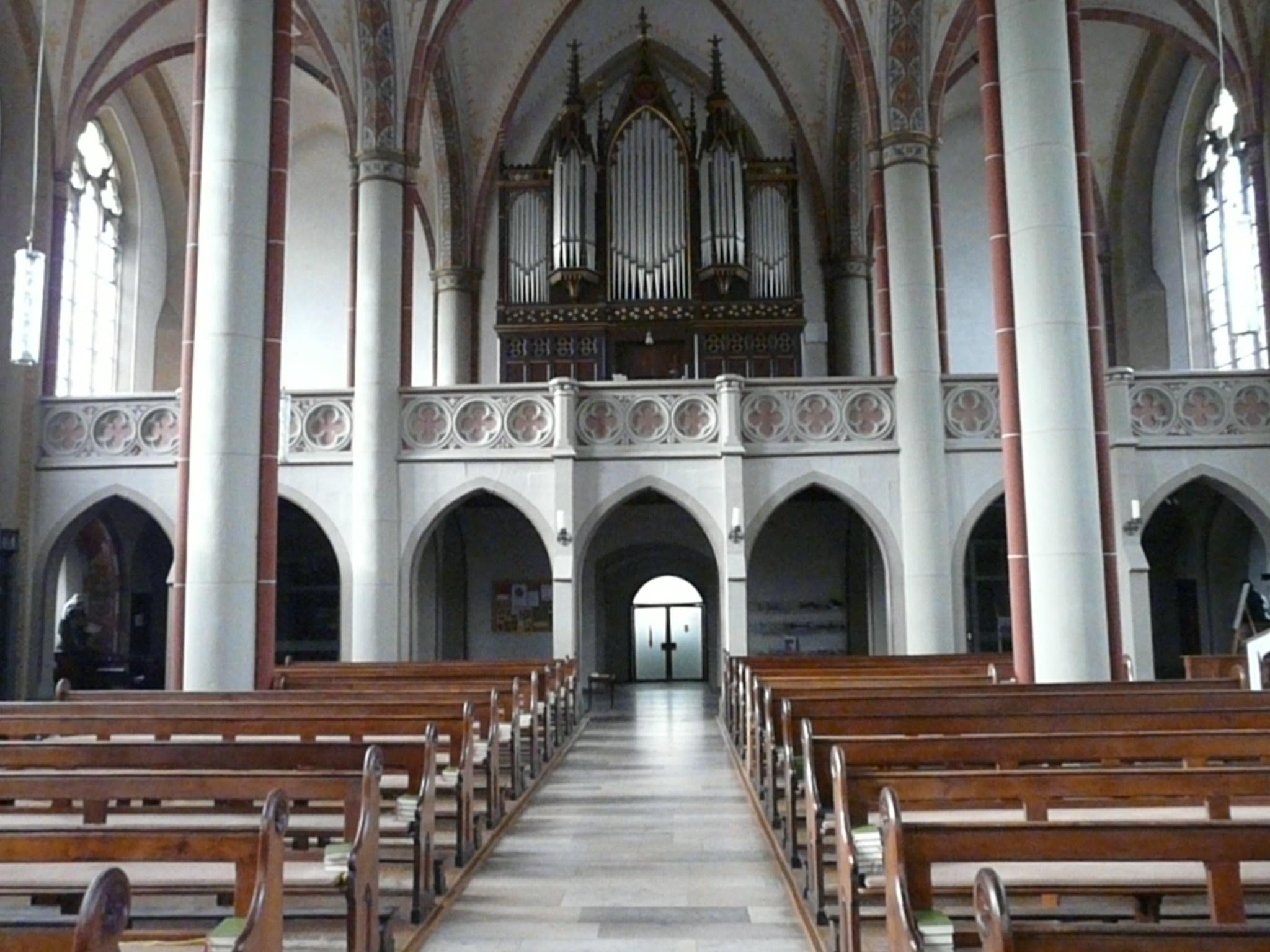 St. Mauritius (Hattingen), quergestellte Eingangshalle mit 7 Arkaden als Orgelbühne